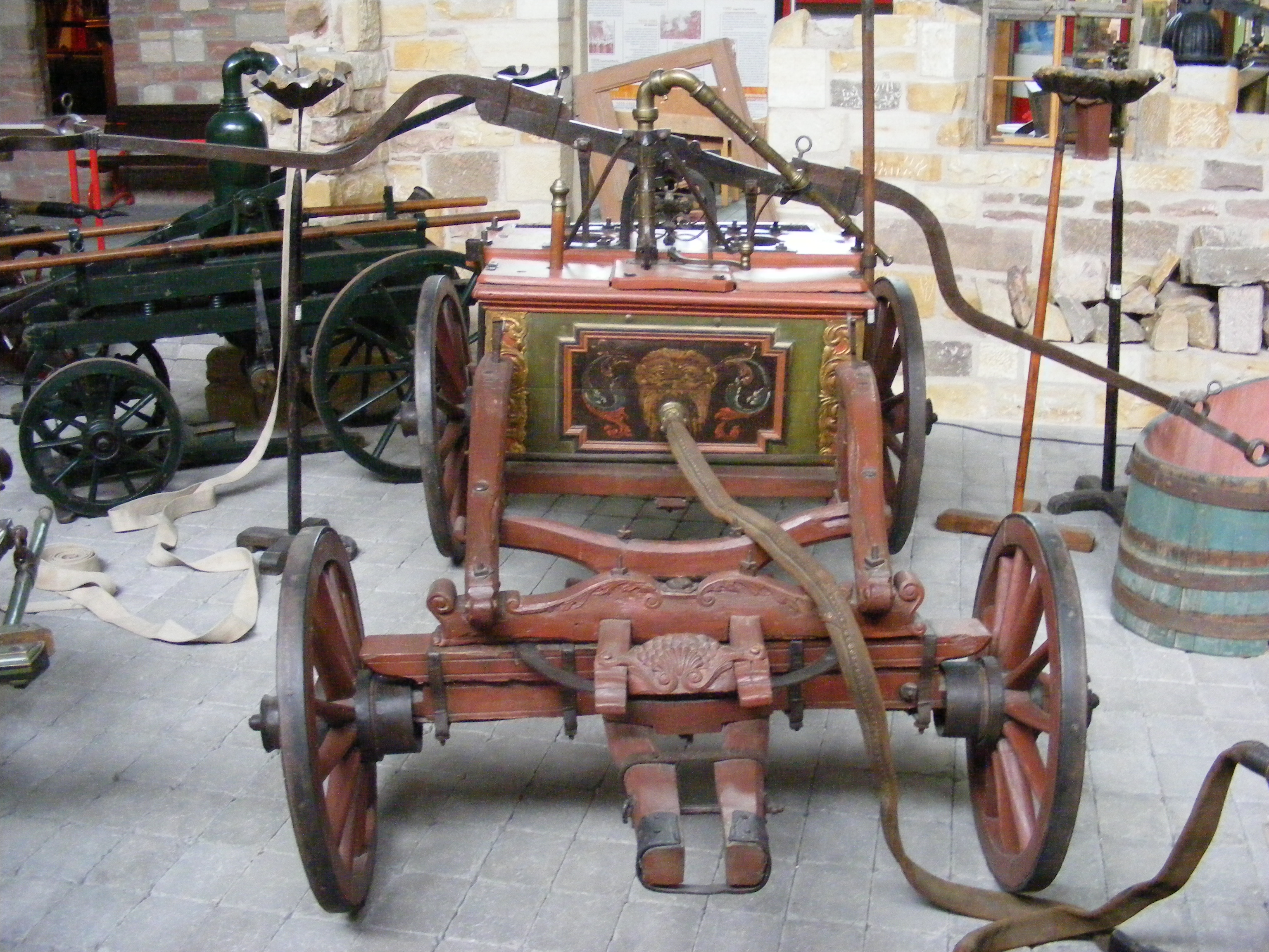 Historische fahrbare Handdruckspritze des Johann Georg und Johann Philipp Bach, für den Pferdezug, Bj. 1751. Sie wurde noch bis 1961 in der Gemeinde Niederwald, heute 35274 Kirchhain (Erstbesitzer) verwendet. Die Feuerspritze wurde 1991 auf Kosten und im Auftrag des DFM restauriert — Front. Exponat im Deutschen Feuerwehrmuseum Fulda, Halle I.